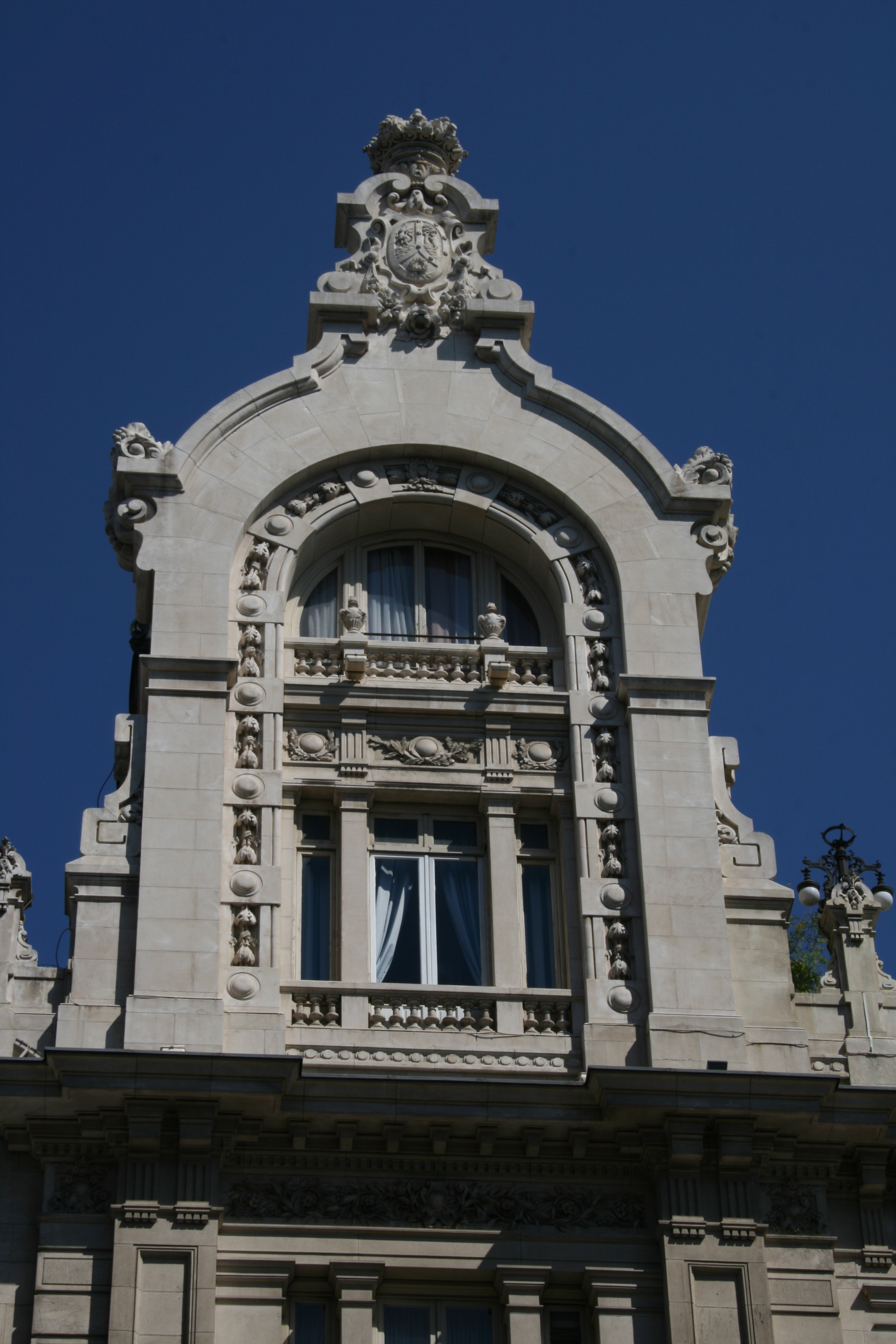 Casino - Madrid